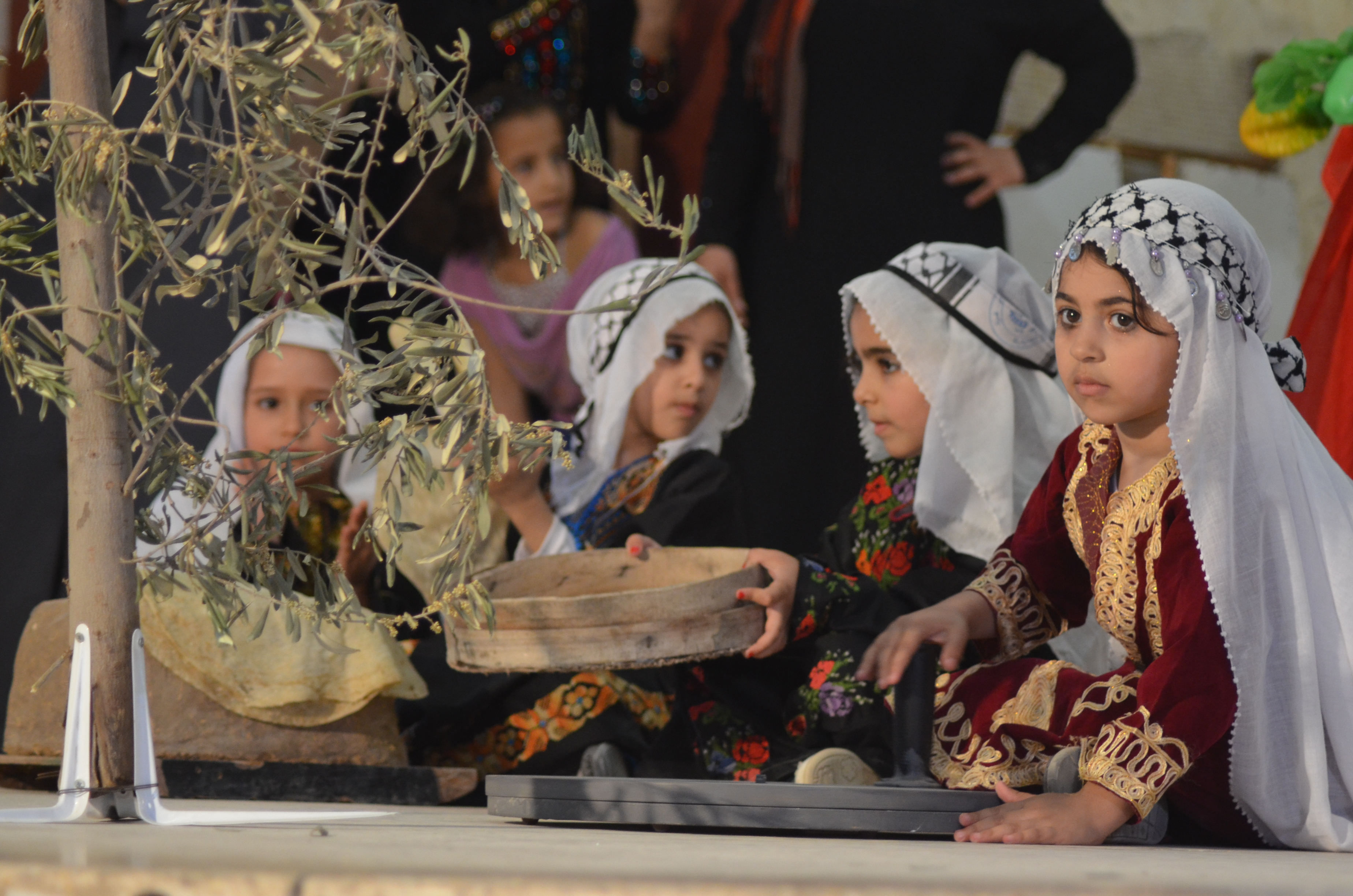 مصرى: إحياء ذكري وطنية تراث فلسطيني